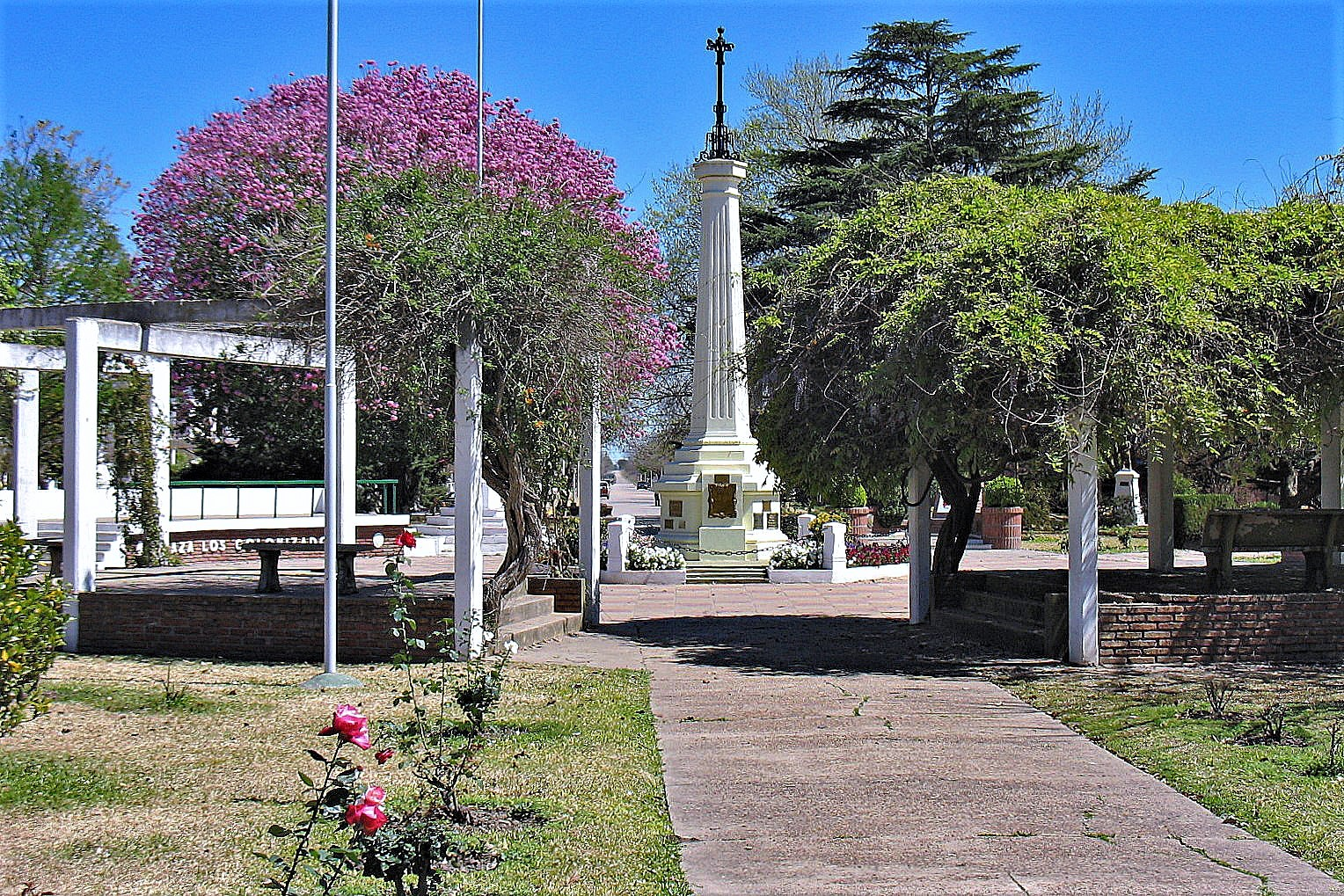 Testimonio descriptivo de un aspecto urbano de Progreso (Santa Fe)